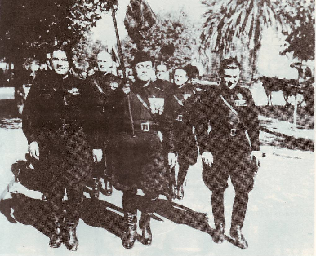 Desfile en la ciudad de La Plata de partidarios fascistas, con distintivos y medallas